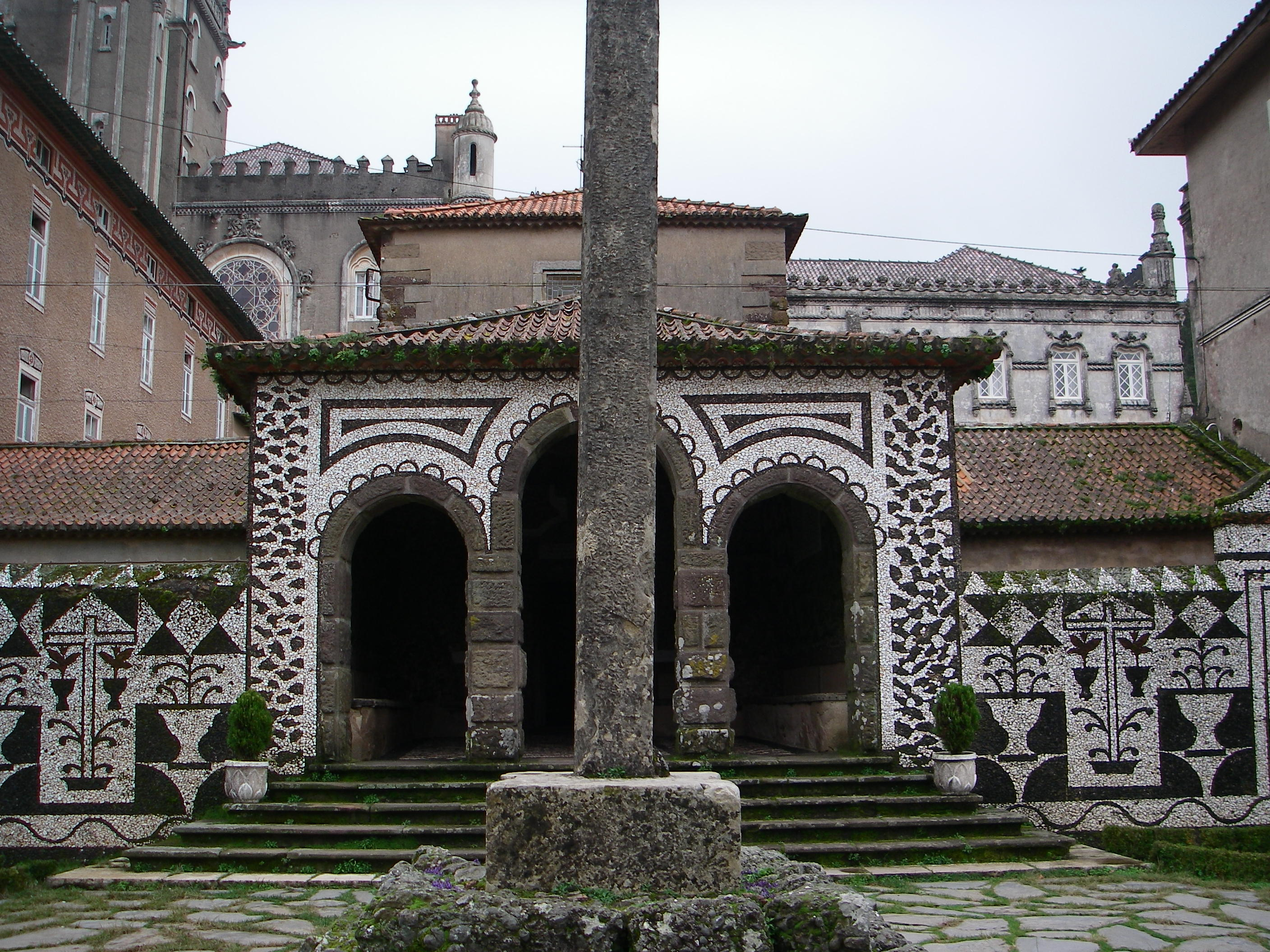 Palácio Hotel de Bussaco, Palacete Hotel do Buçaco ou Palace Hotel do Buçaco e mata envolvente, incluindo as capelas e ermidas, Cruz Alta em conjunto com o Convento de Santa Cruz do Buçaco This file was uploaded for Wiki Loves Monuments in Portugal with the unique identifier 74851.